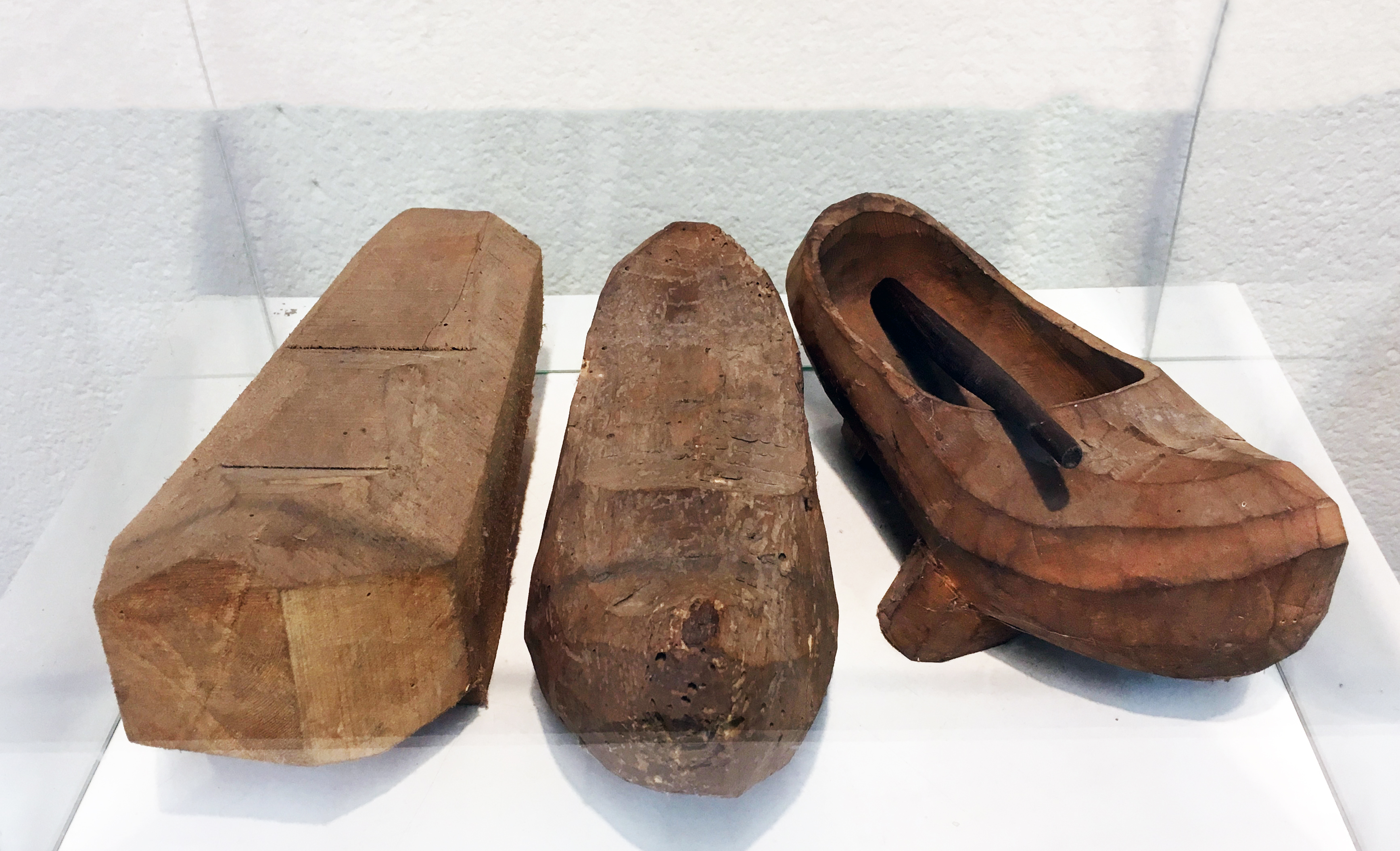 Estados previos a la talla de una madreña asturiana, procedente del Museo etnográfico de Grado (Asturias)